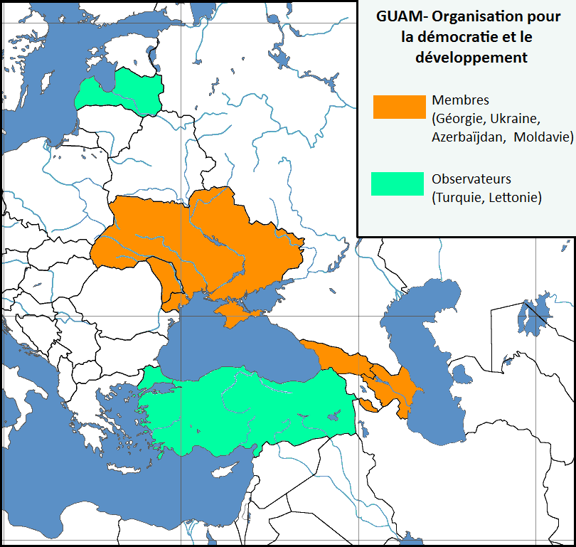 Le GUAM, Organisation pour la démocratie et le développement, une organisation internationale de coopération à vocation régionale regroupant quatre États : Géorgie, Ukraine, Azerbaïdjan et Moldavie. (en russe: Организация за демократию и экономическое развитие - ГУАМ et anglais: GUAM Organization for Democracy and Economic Development) Version francophone de File:Europe location GUAM.png